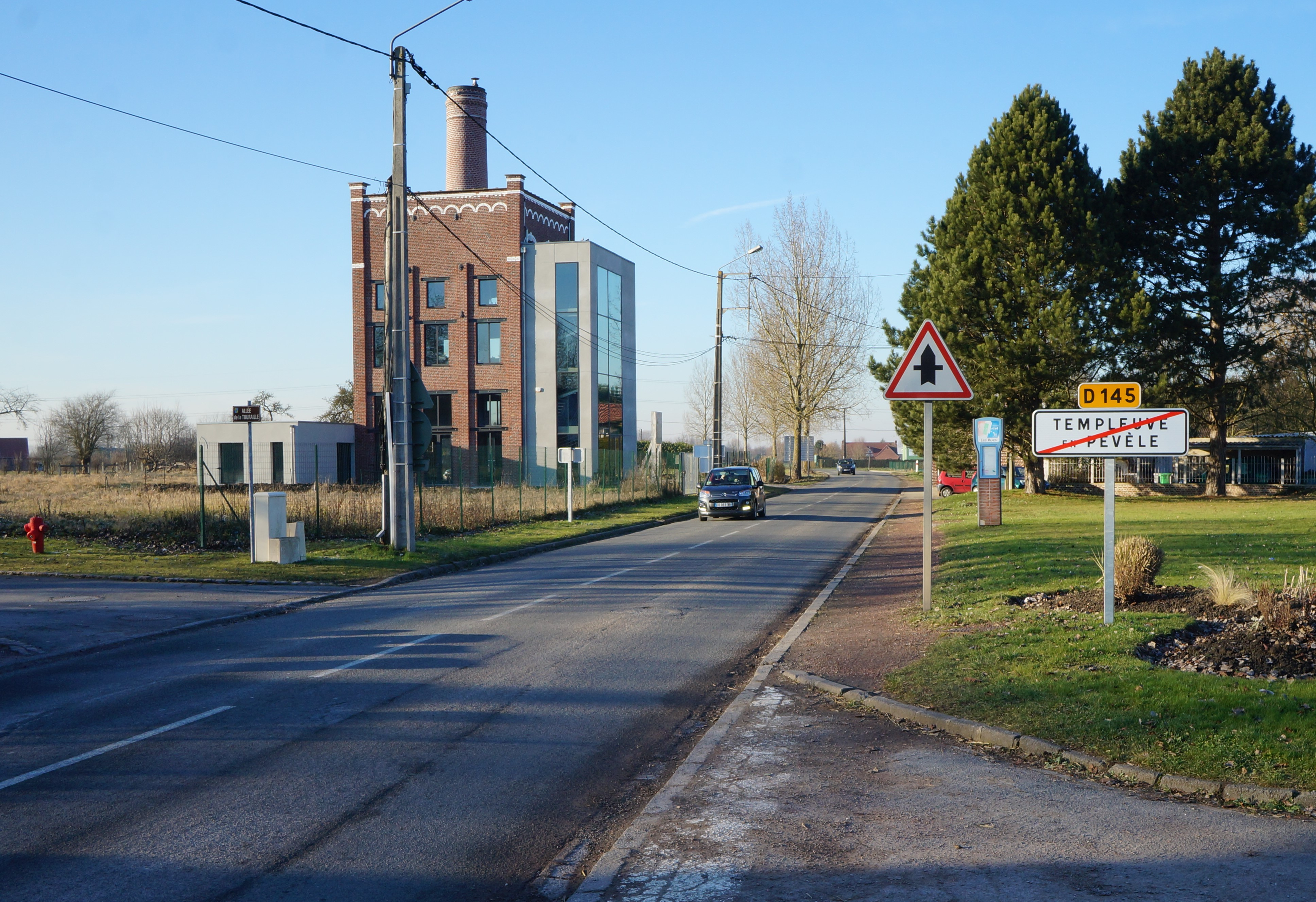 l'ancienne tour brasserie Lambelin de Templeuve (Nord, France).